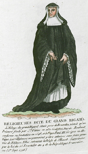 Collection de costumes de tous les ordres monastiques, supprimés à differentes époques, dans la ci-devant Belgique, Bruxelles, Philippe Joseph Maillart et sœur, 1811